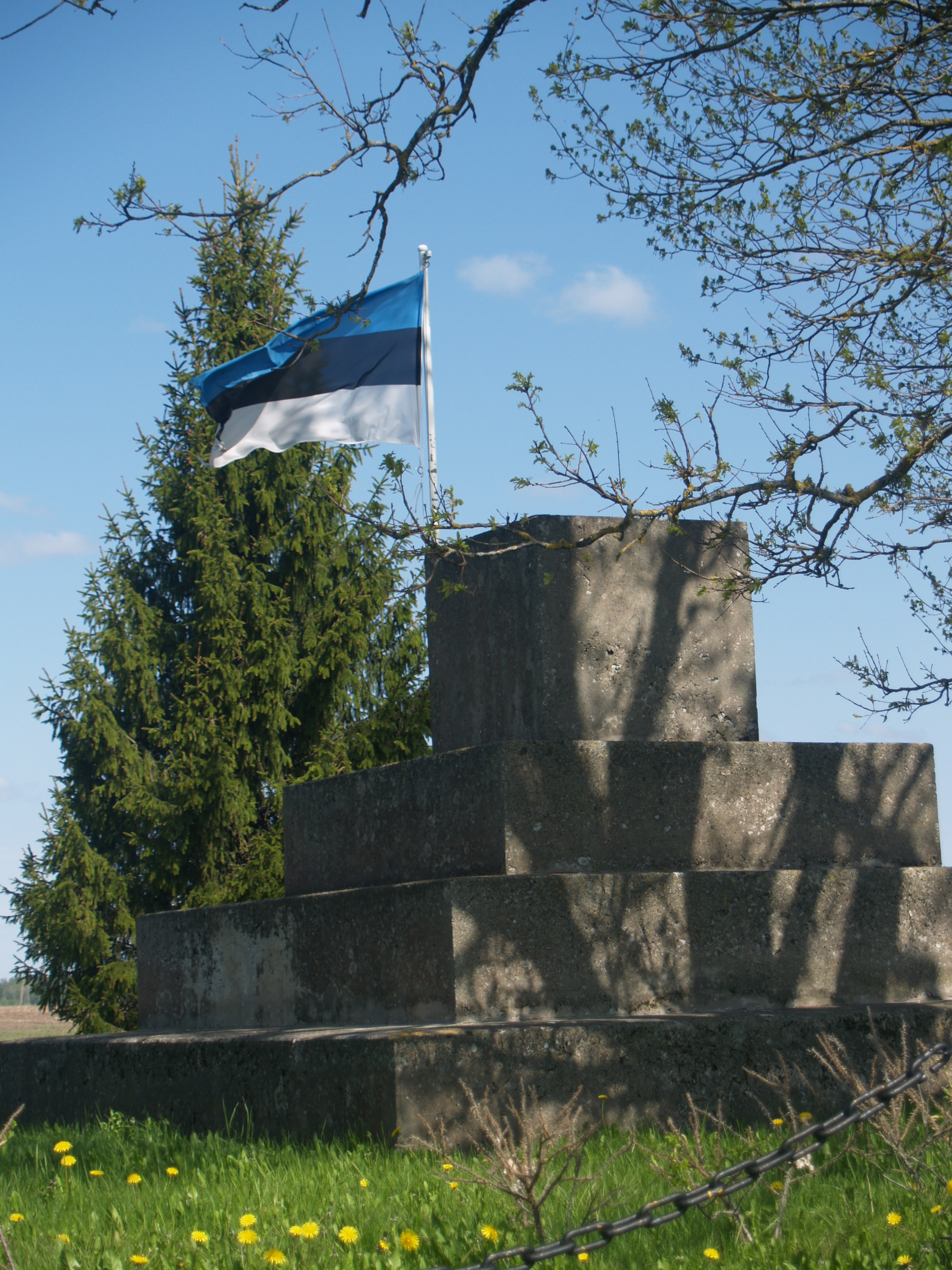 Aidu lahingu mälestusmärk Pajusi vallas